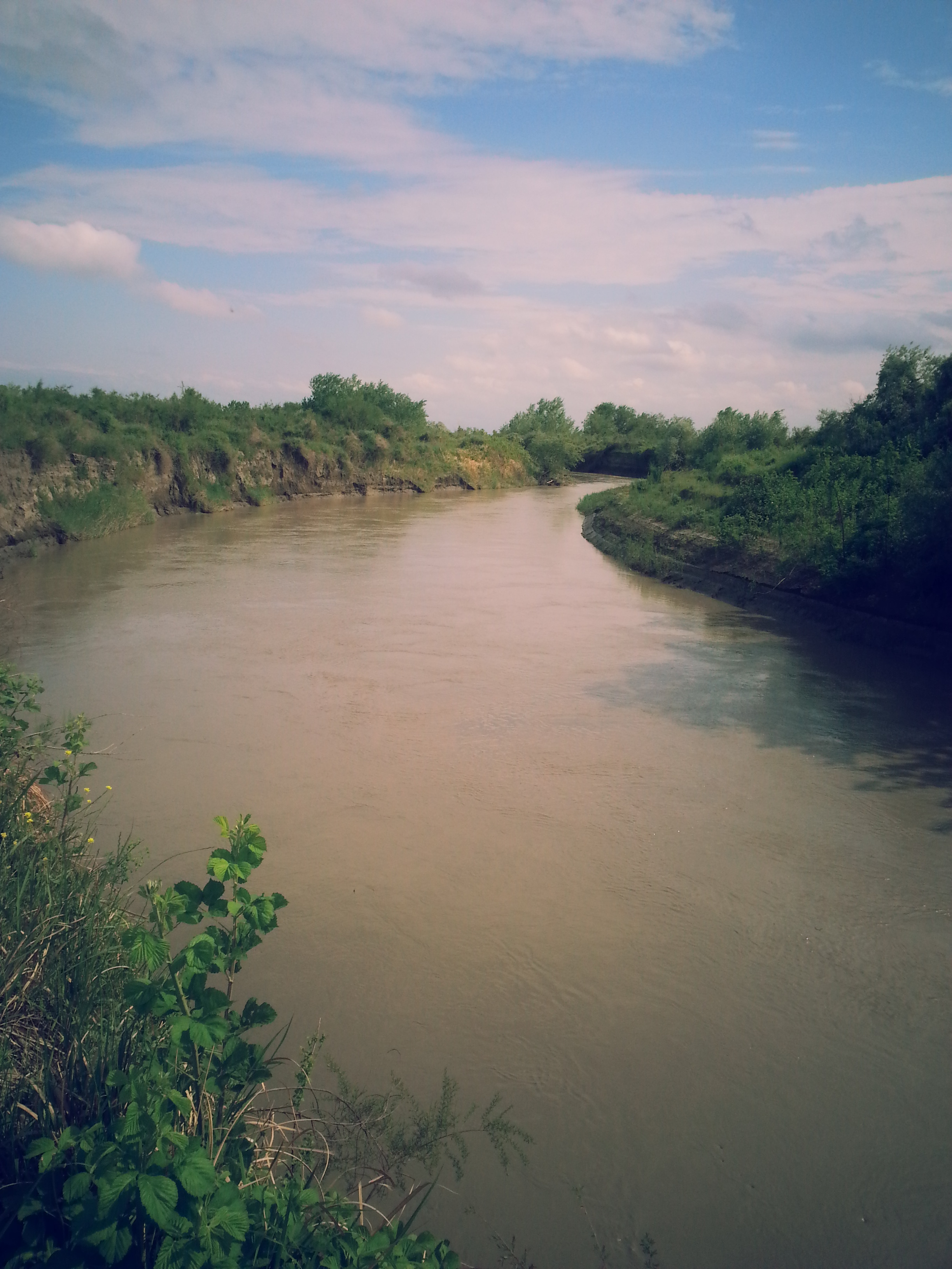 Türyançay